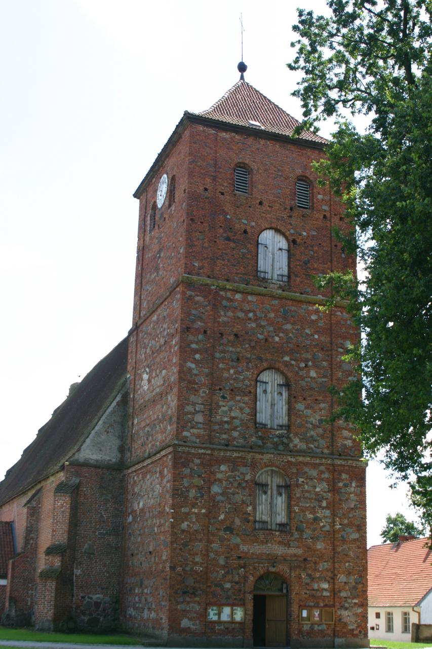 Barciany